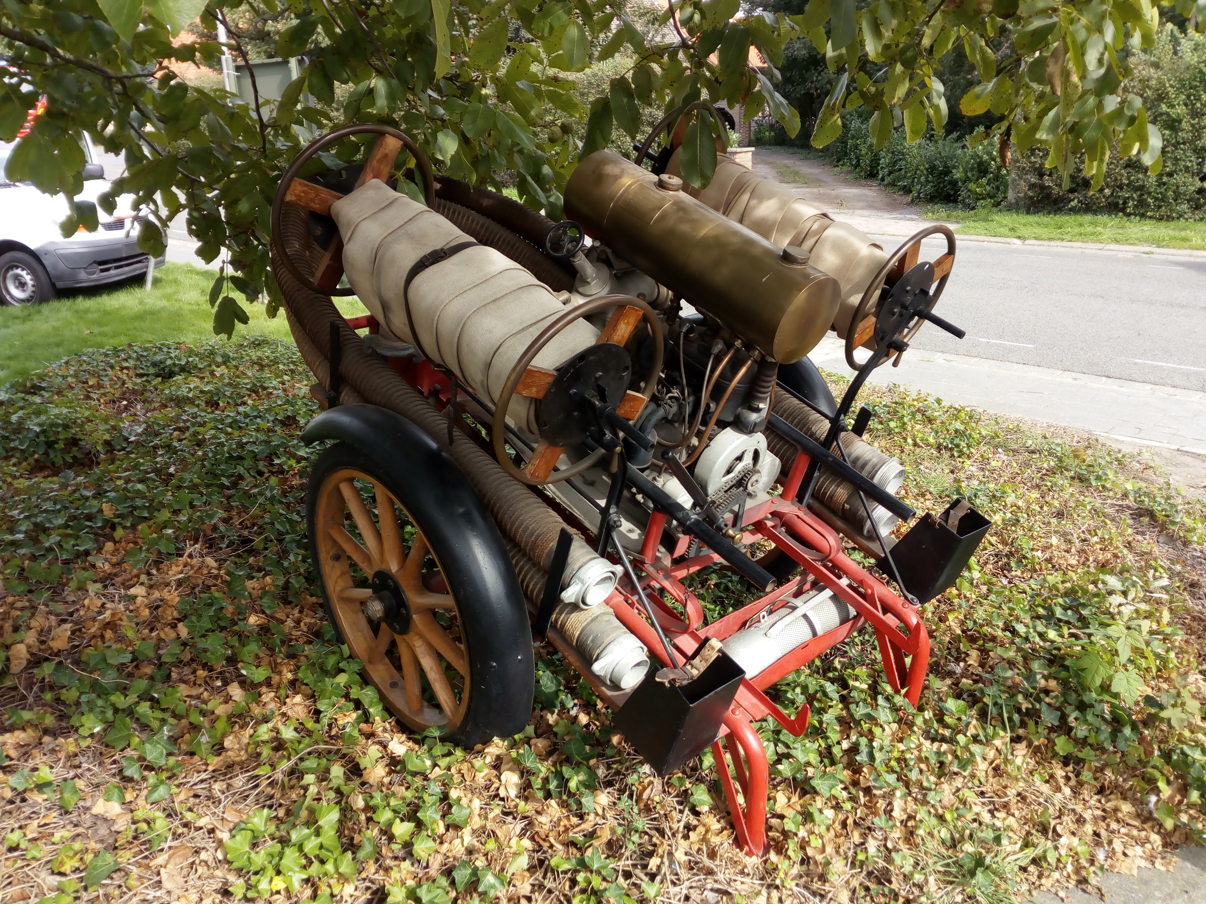 brandweerpompwagen